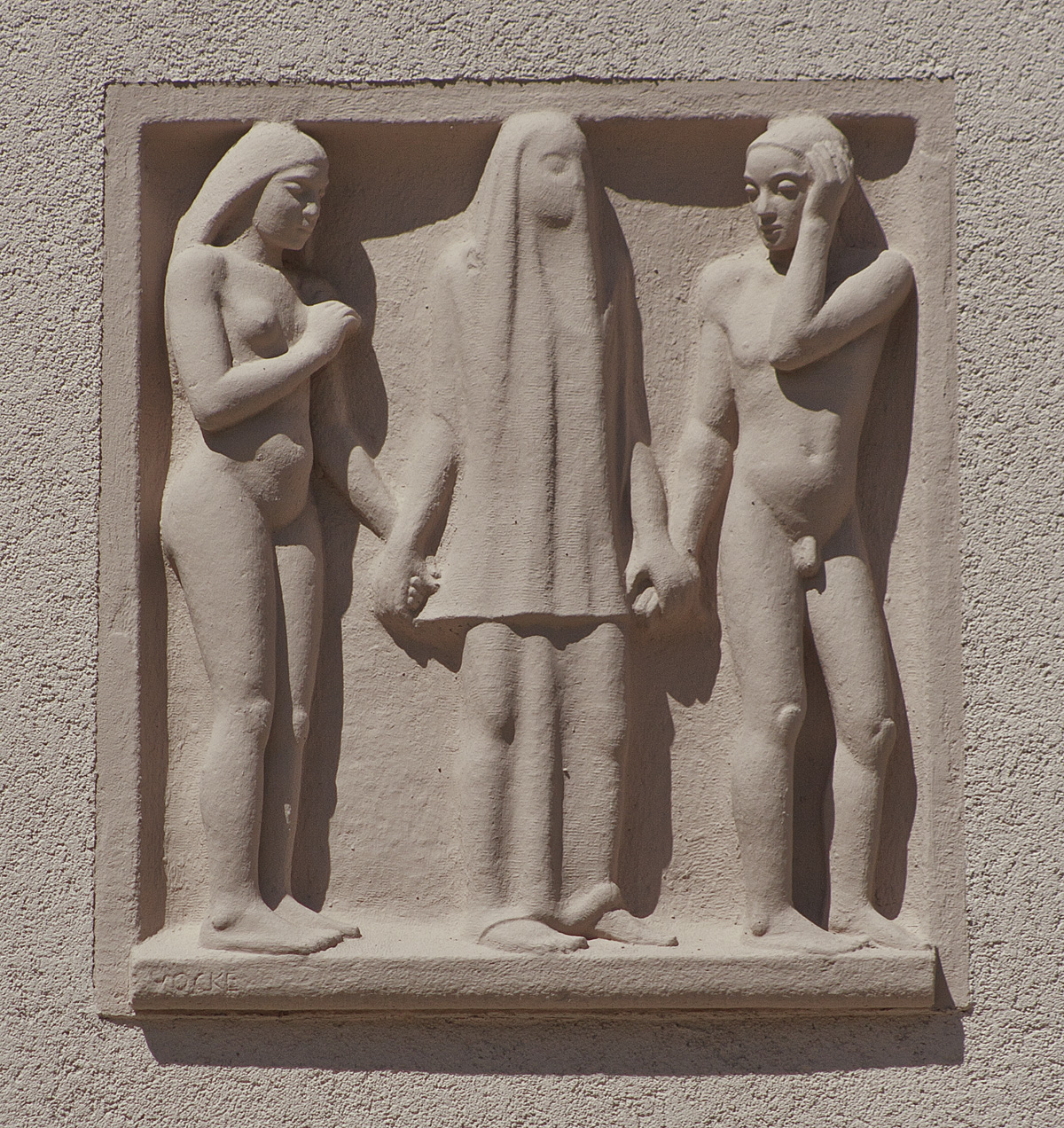 Rzeźba nad głównym wejściem do kaplicy na Cmentarzu Osobowickim